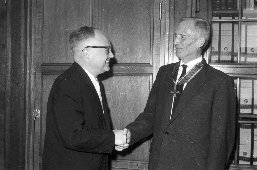 Kultusminister Edo Osterloh (links) gratuliert dem ehemaligen Rektor der Pädagogischen Hochschule (PH) Prof. Dr. Paul-Gerhard Bohne (rechts) zum Großen Verdienstkreuz des Verdienstordens der Bundesrepublik Deutschland.